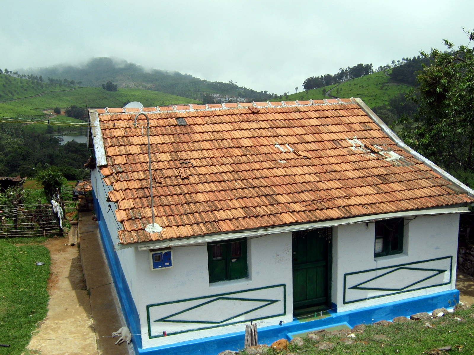 Tamil Nadu, India.